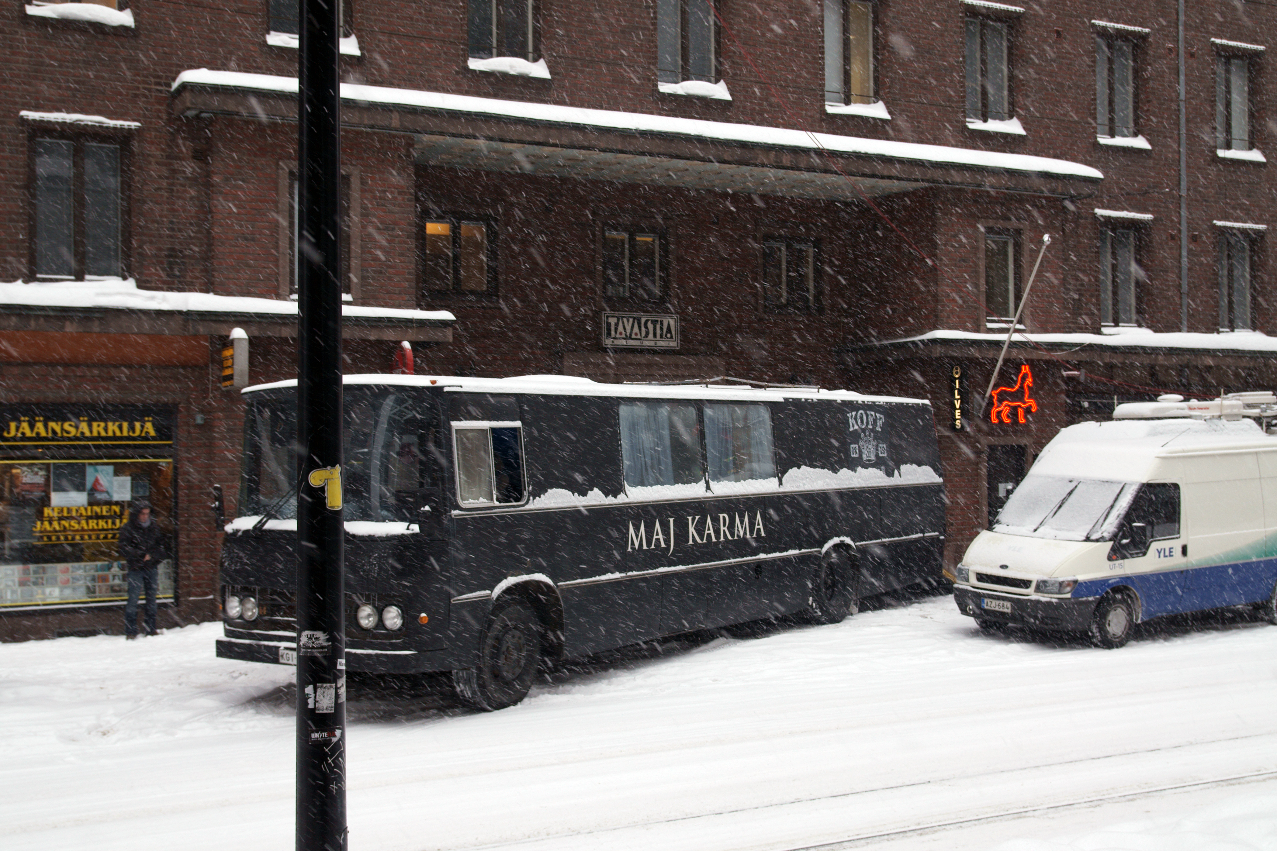 Maj Karman keikkabussi Hajokki Tavastia-klubin edessä.